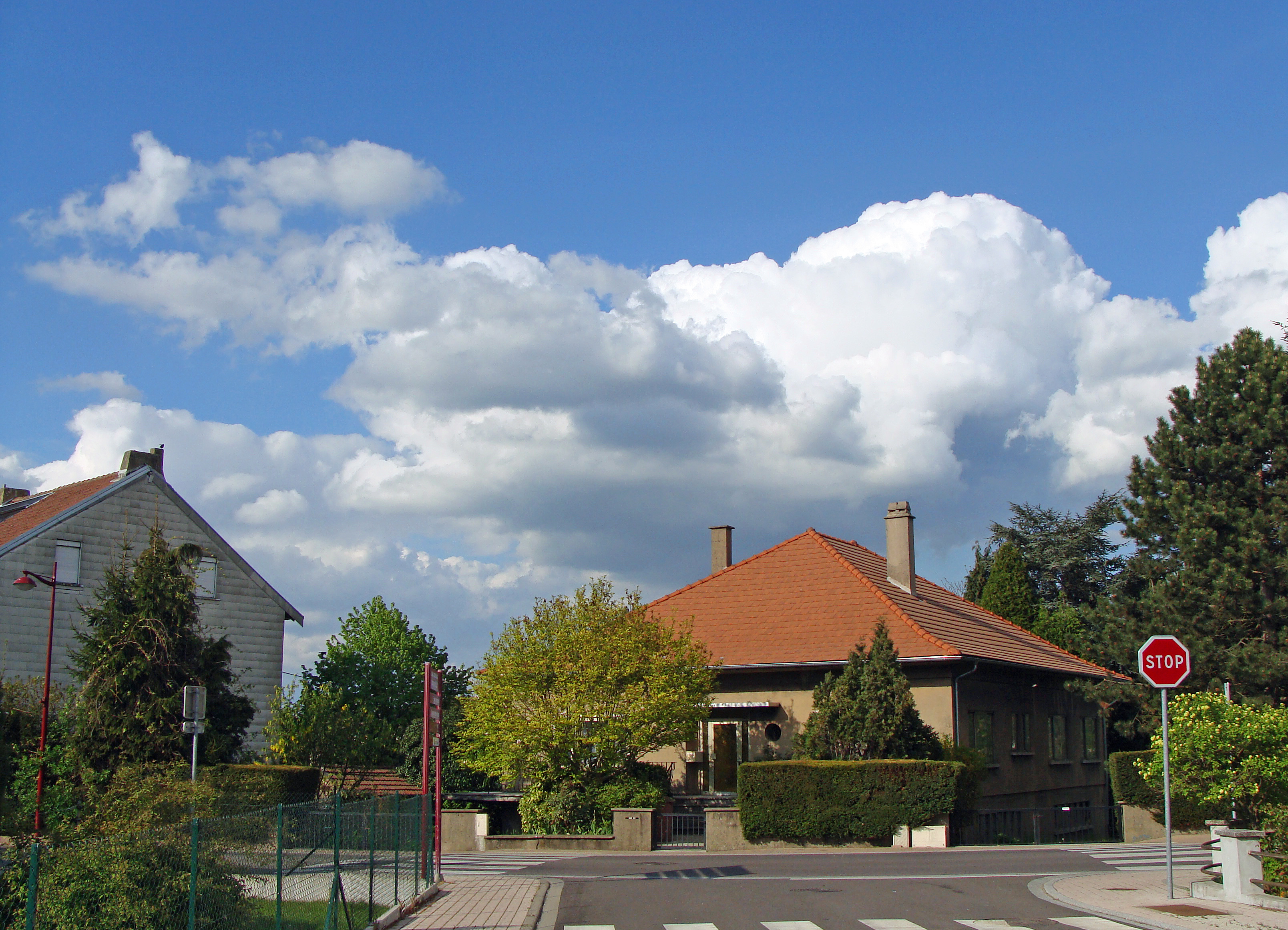 Quartier Ziegelstücker, rue de Carling (vue prise de la rue Charles July) à L'Hôpital (Moselle)